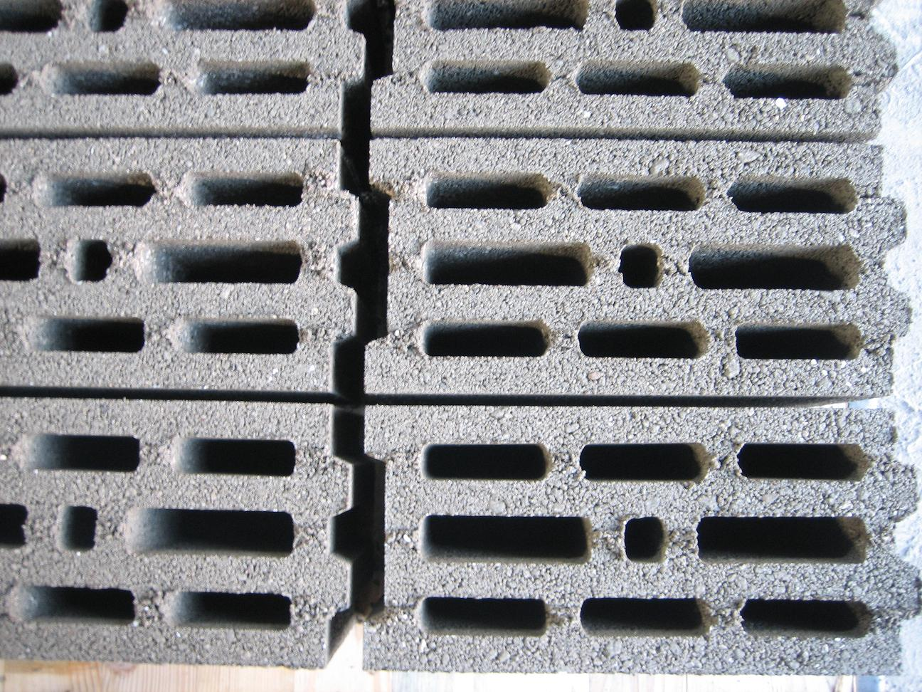 19 luk 9 gözlü briket